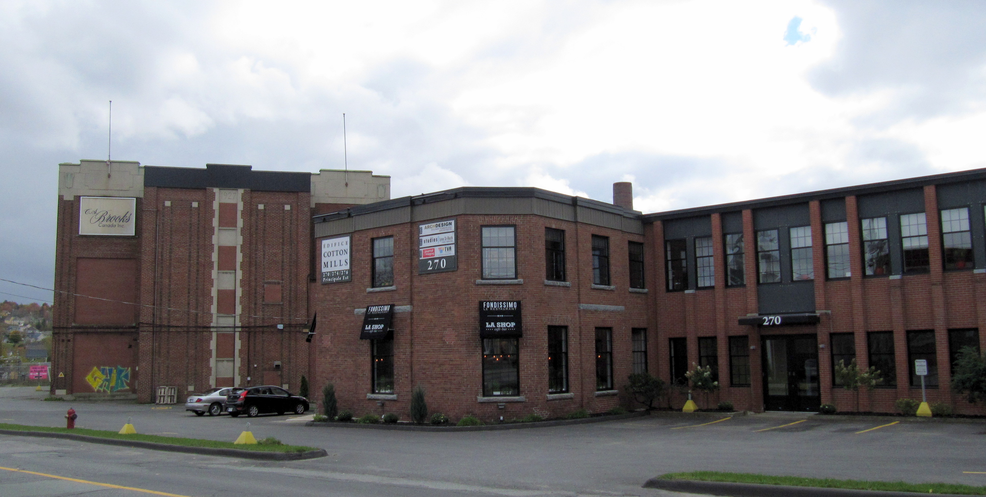 Usine de textile de Magog. Lieu historique national du Canada (id : 638). Située au 160 rue Principale Est à Magog, Québec.